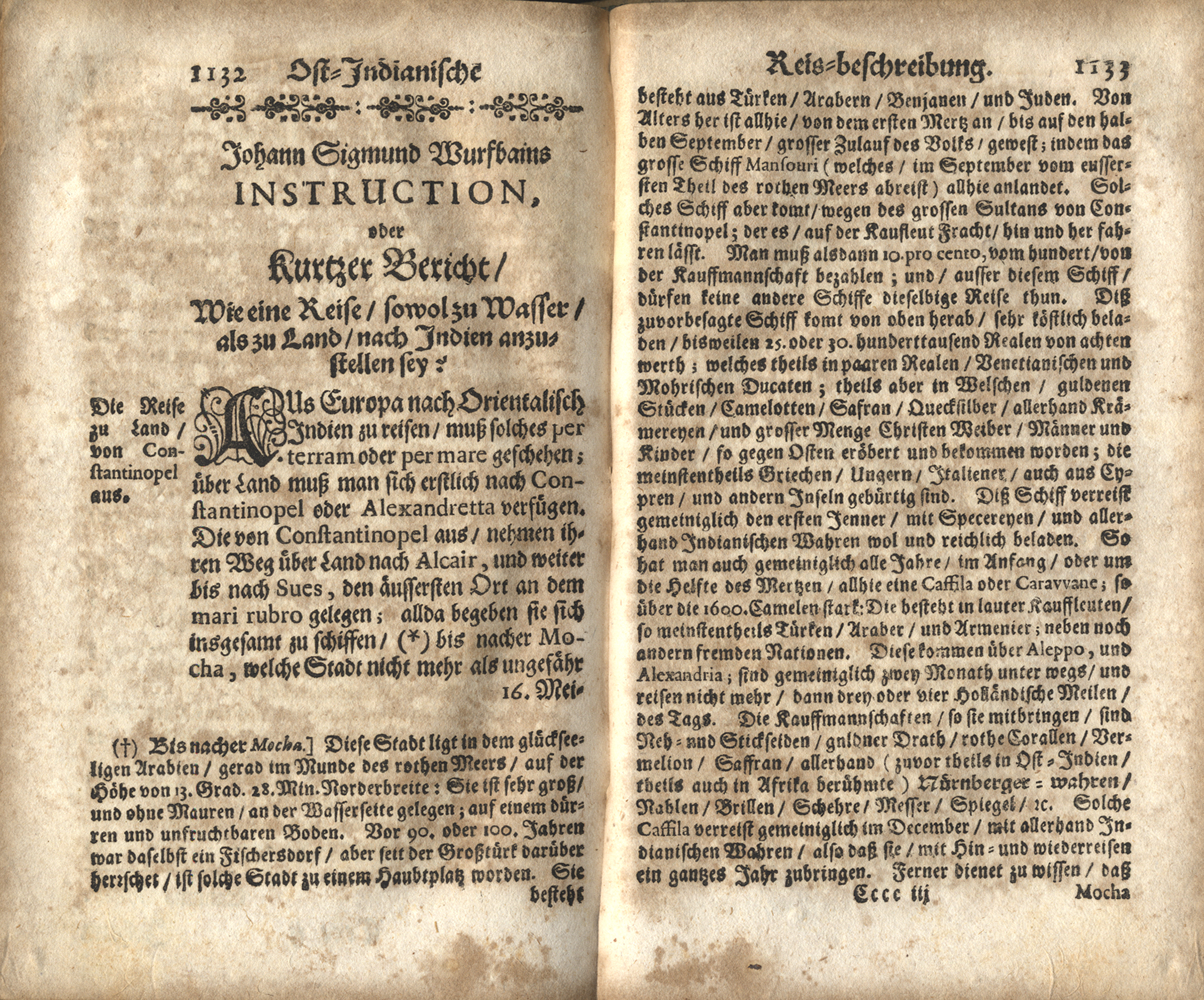 Kurzer Bericht, wie eine Reise, sowohl zu Wasser, als zu Land, nach Indien anzustellen sei